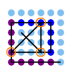 Lösung für das n x n Punkte Problem ausgehend von der 3 x 3 Lösung (hellblau) über die 4 x 4 Lösung (dunkelblau) zur 5 x 5 Lösung (lila)